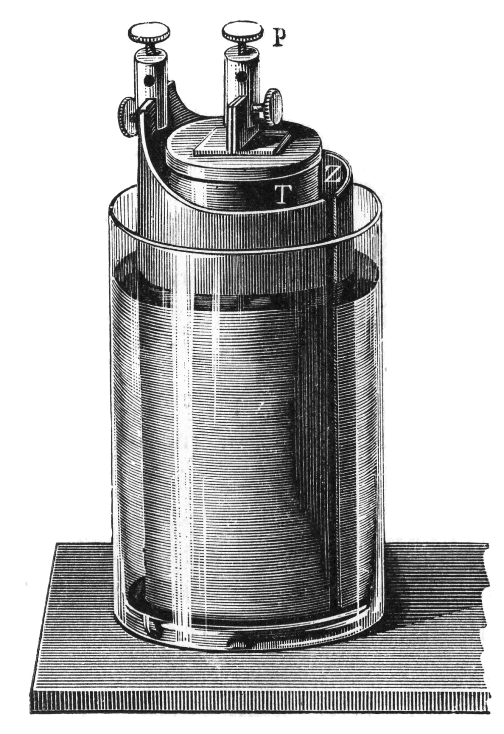 Galvanisches Element nach William Grove.